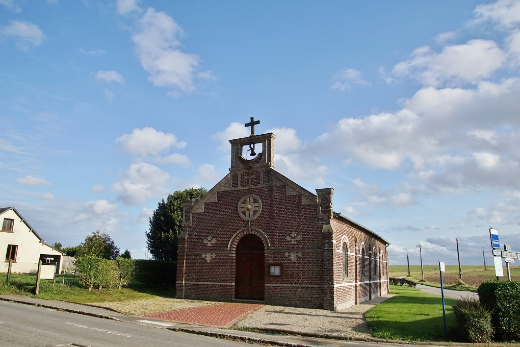 Église Sainte-Thérèse-de-l'Enfant-Jésus de Fongueusemare (76).